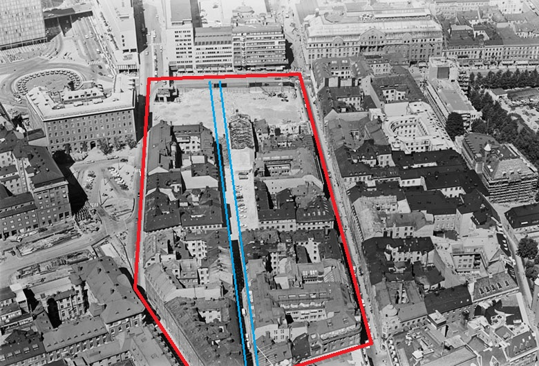 Kvarteret Trollhättan och Norra Smedjegatan under rivning